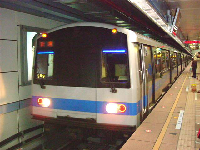 中文（台灣）: 台北捷運321型電聯車行駛板南線